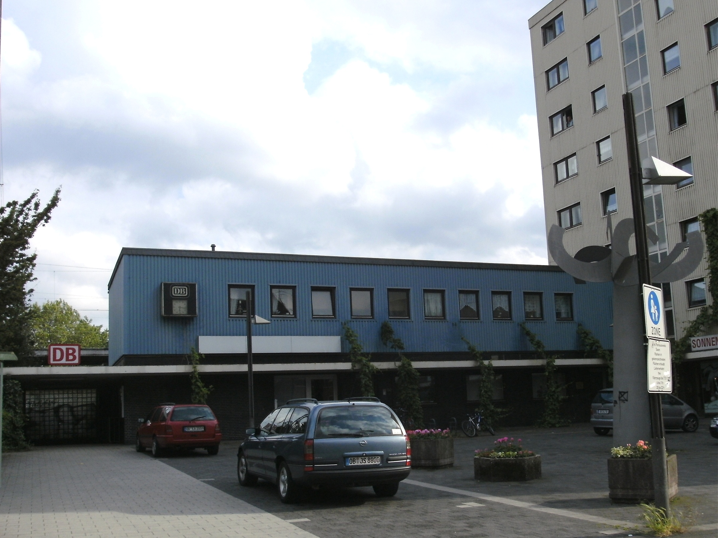 Bahnhof Oberhausen Osterfeld-Süd